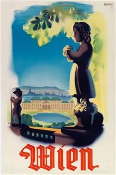 Wien